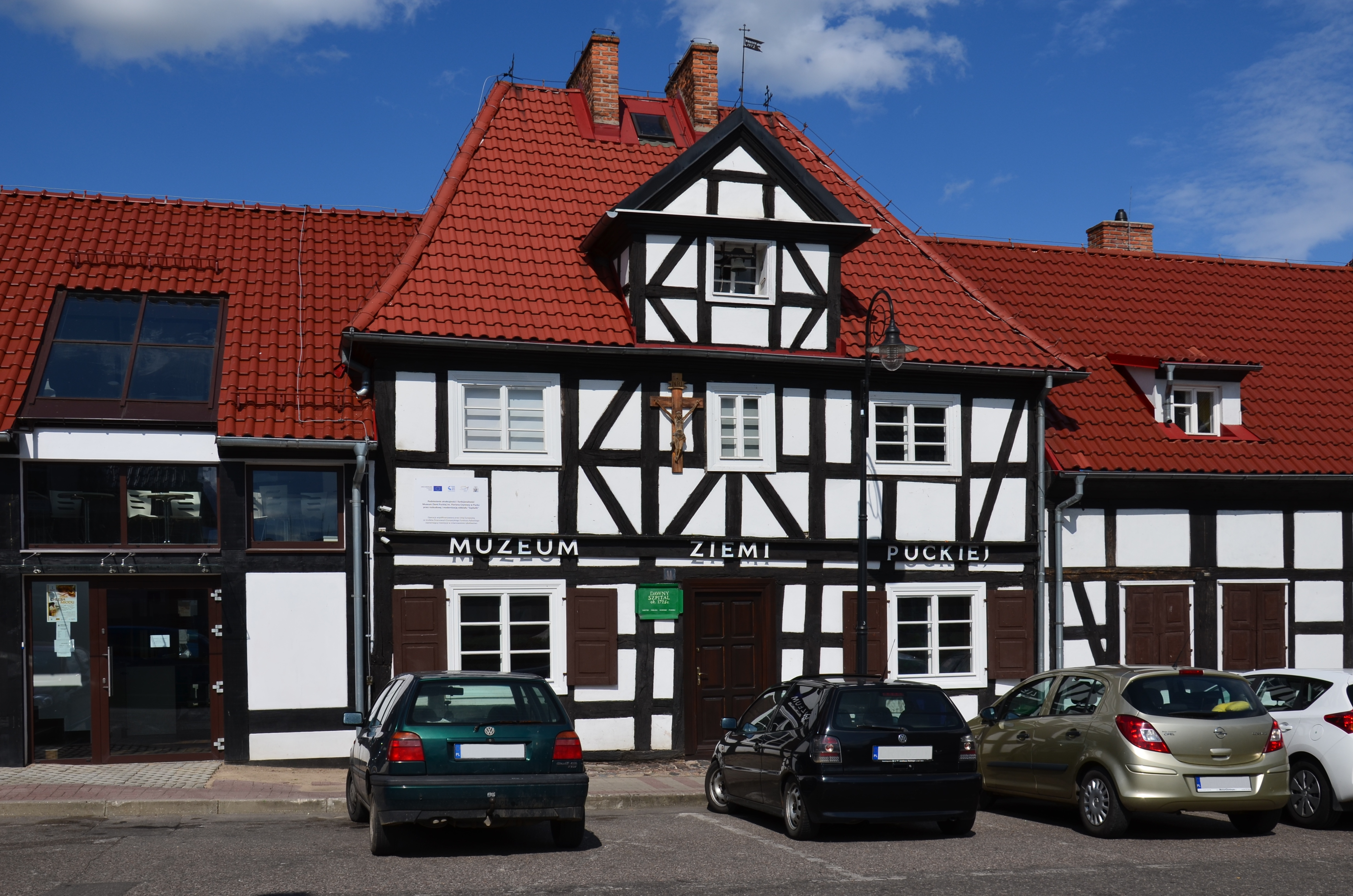 Puck, szpital p.w. św. Jerzego, ob. siedziba Towarzystwa Kulturalnego, XVIII